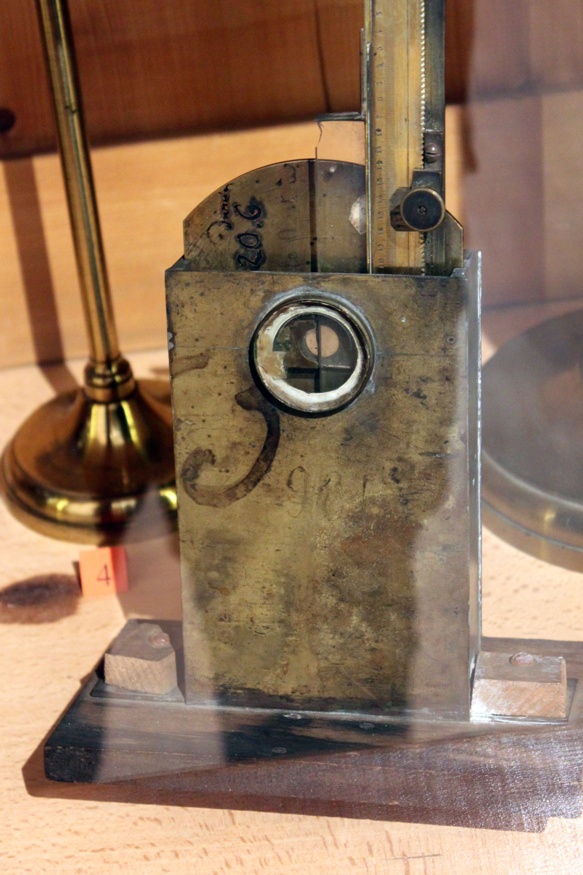 Compensateur de Billet, 1862, Nodot et Billet, Collections scientifiques de l'Université de Bourgogne, Musée de la vie bourguignonne, Dijon, Côte-d'or, Bourgogne, France